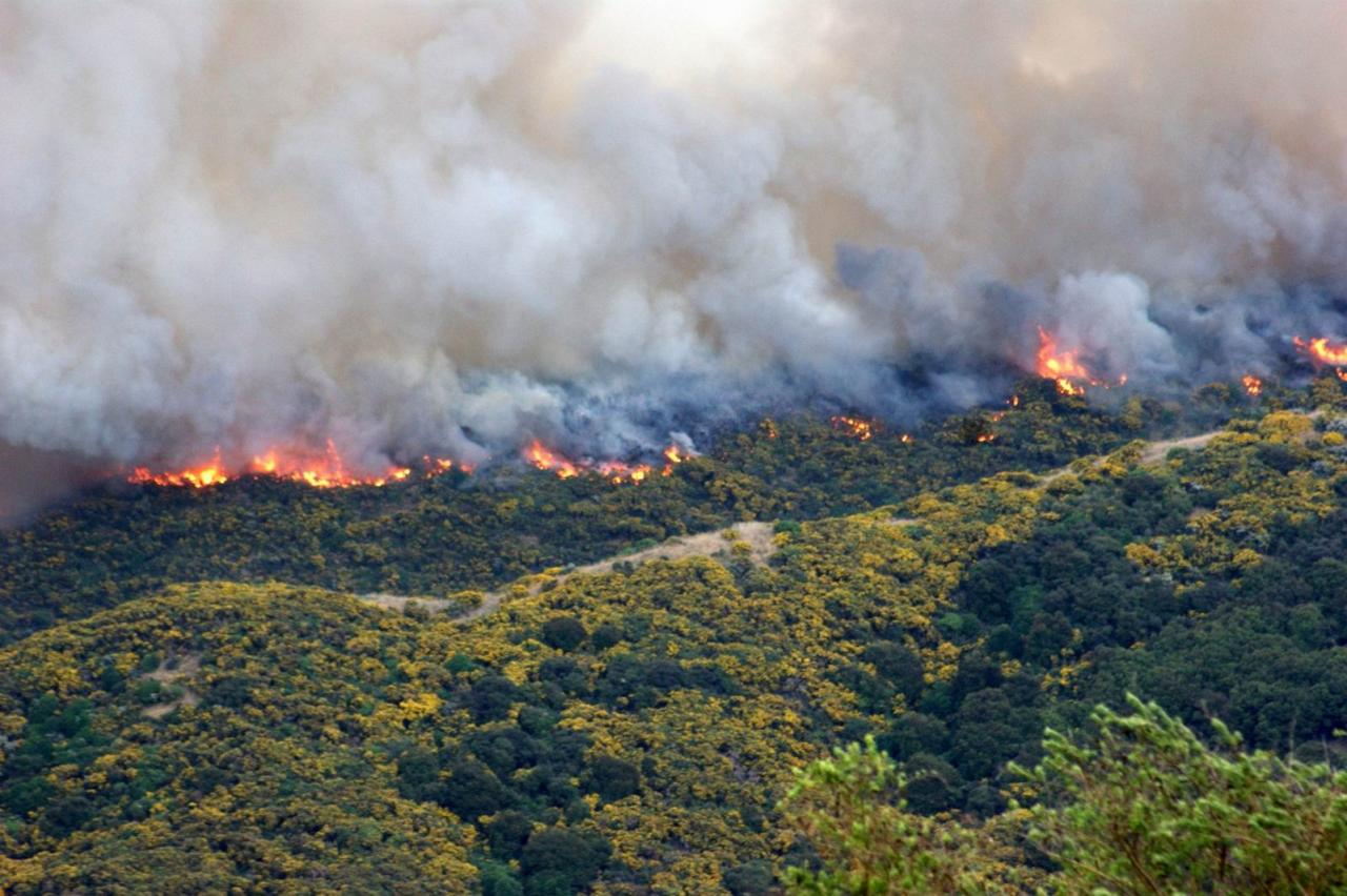 Titahi Bay Scrub Fire